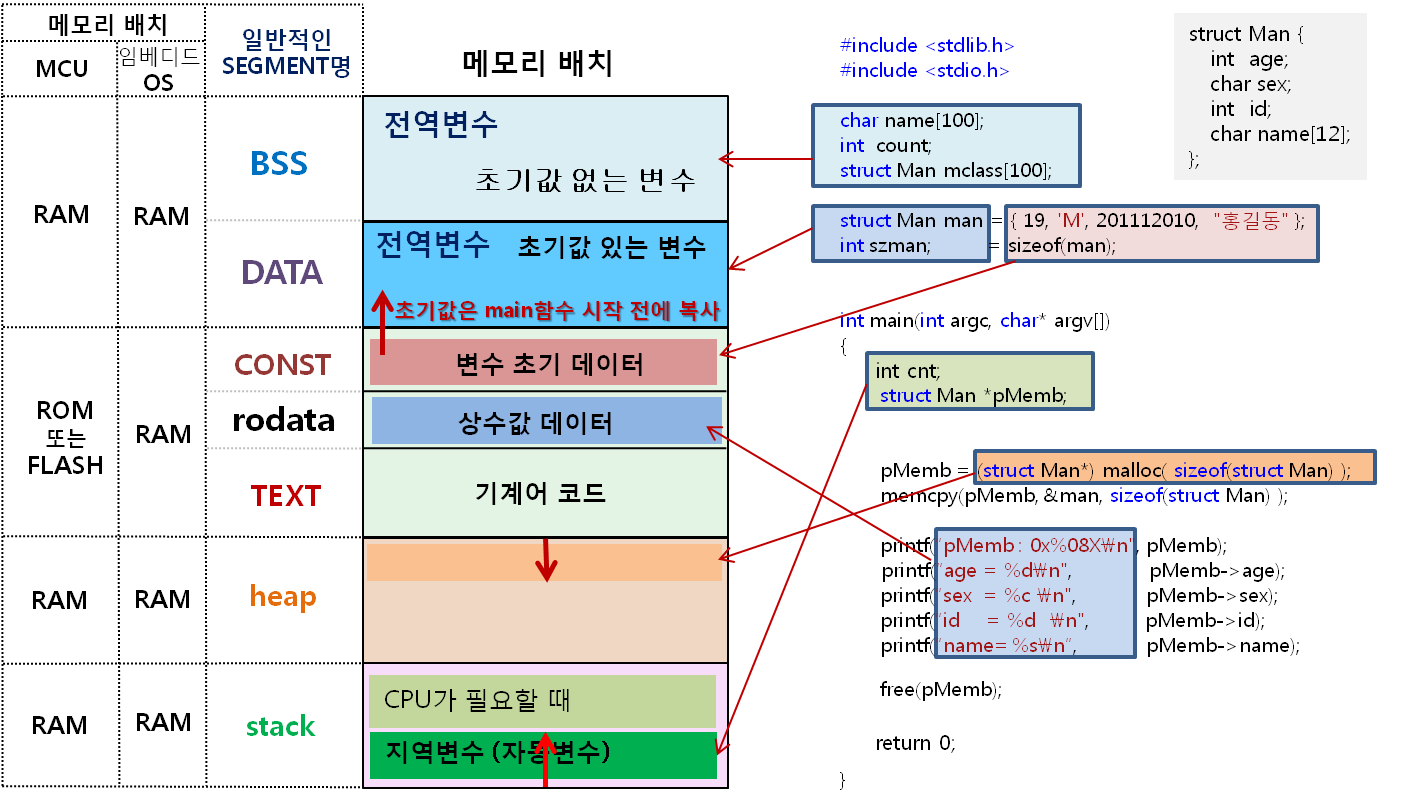 C언어 프로세서 메모리 맵 예